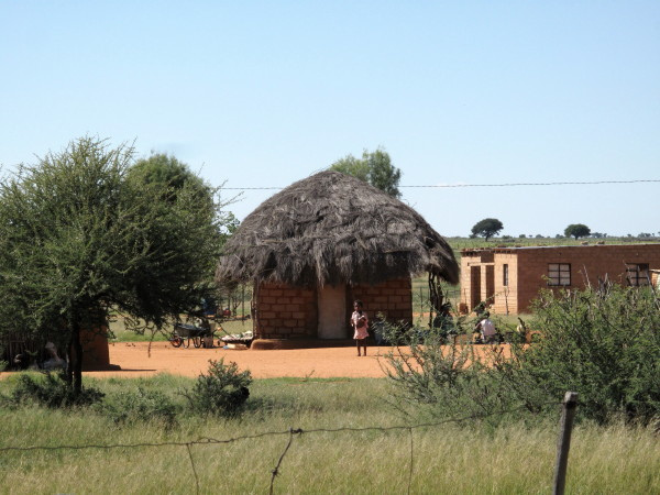 Dithakong Hut